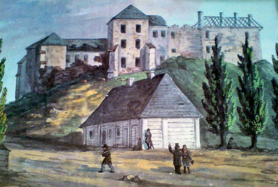 Widok ruin zamku w Solcu nad Wisłą z "Albumów" Kazimierza Stronczyńskiego wykonany w połowie XIX wieku.